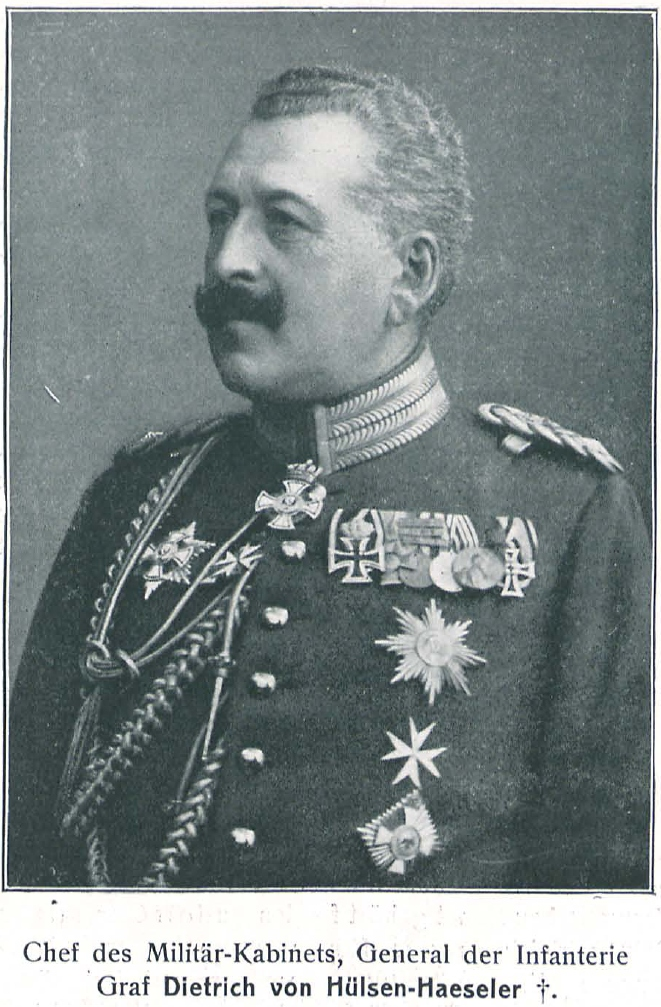 Hans Dietrich Graf von Hülsen-Haeseler (1852-1908), preußischer General der Infanterie, Chef des kaiserlichen Militärkabinetts.